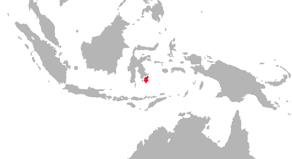 Carte de répartition du macaque de Buton-Muna. Etablie par Christophe Chauvin.